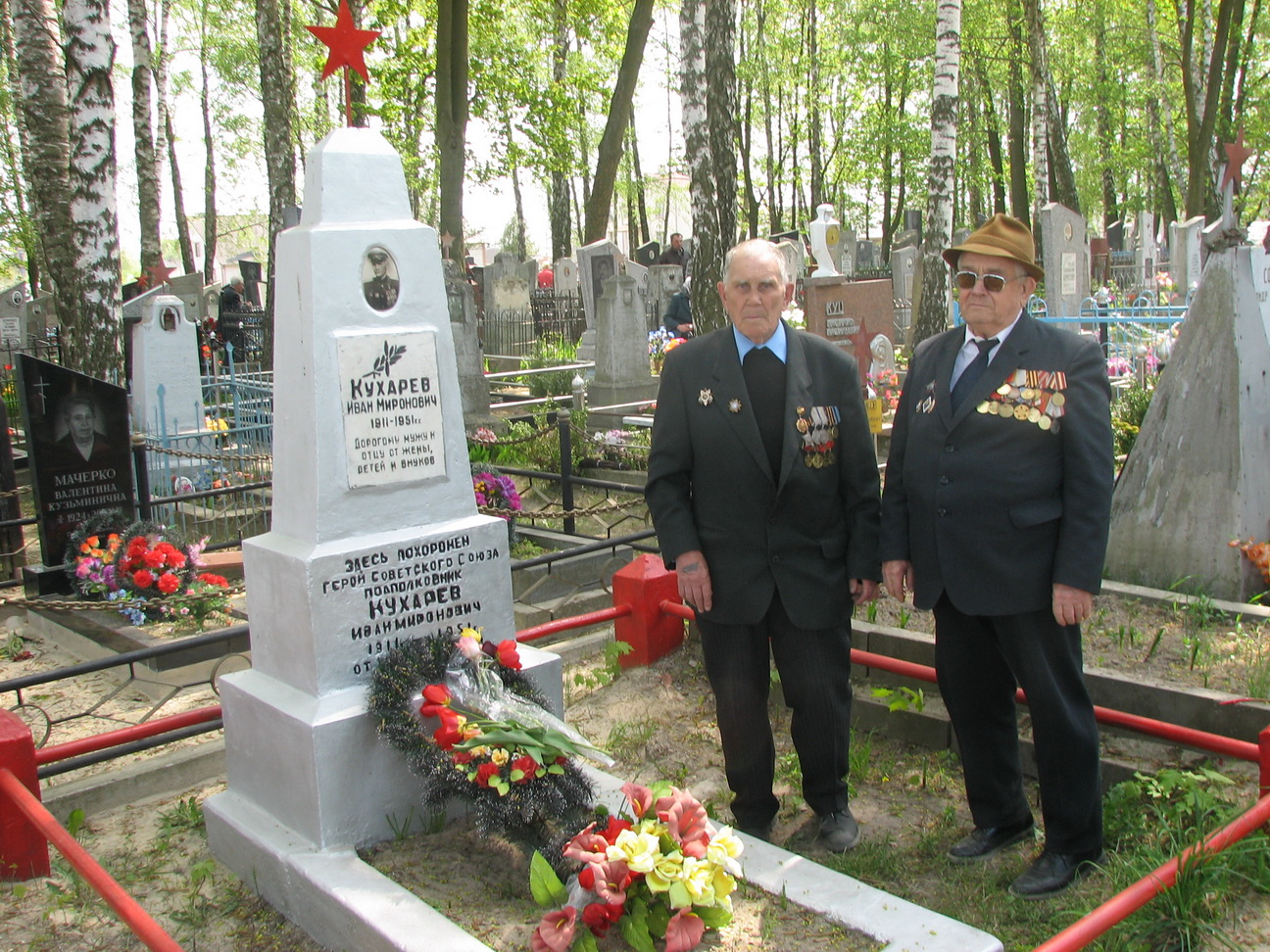 Беларуская (тарашкевіца): Магіла Івана Кухарава на могілках Пружанаў (Беларусь)